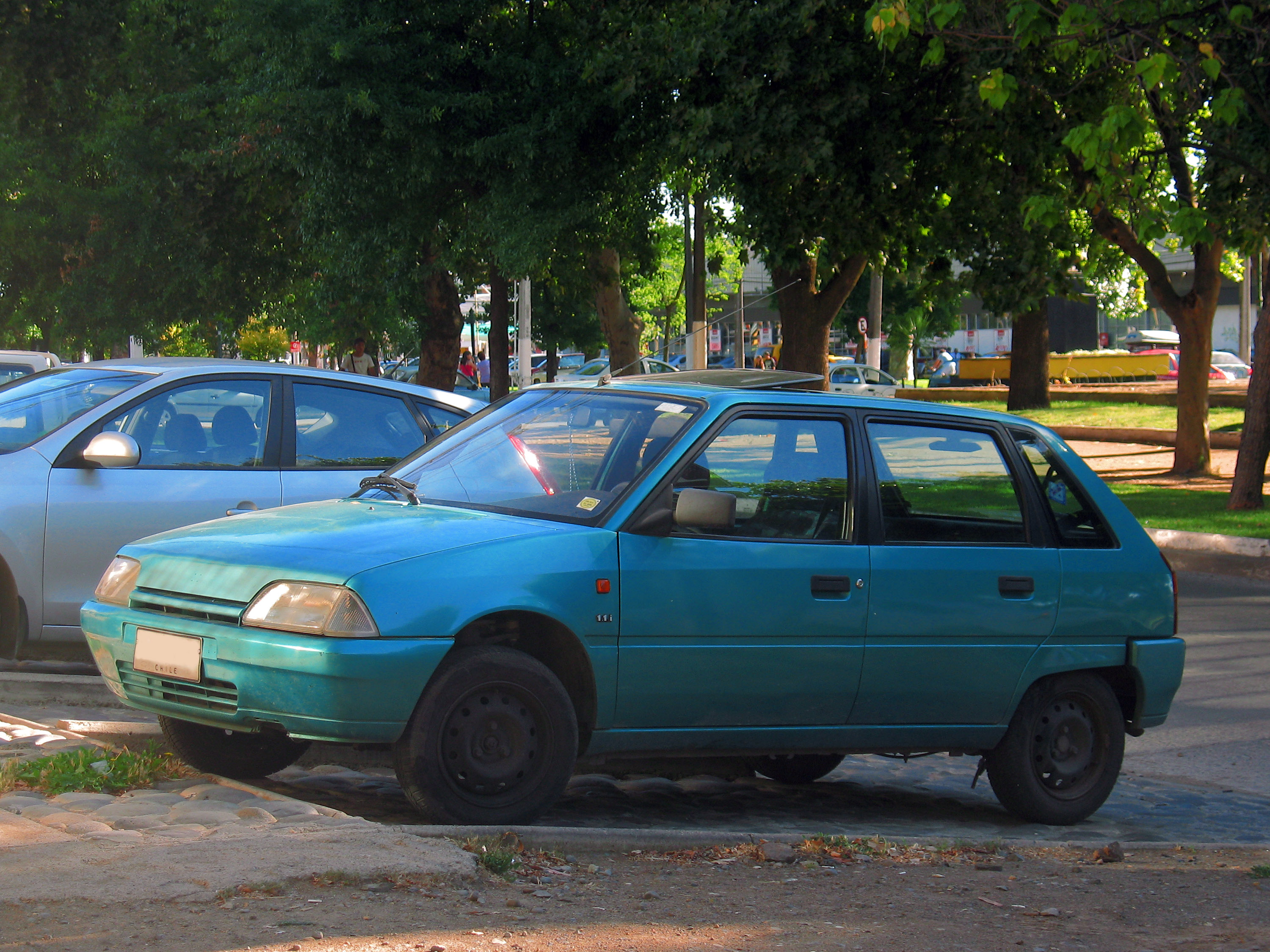 Citroen AX 1.1i Tonic 1995